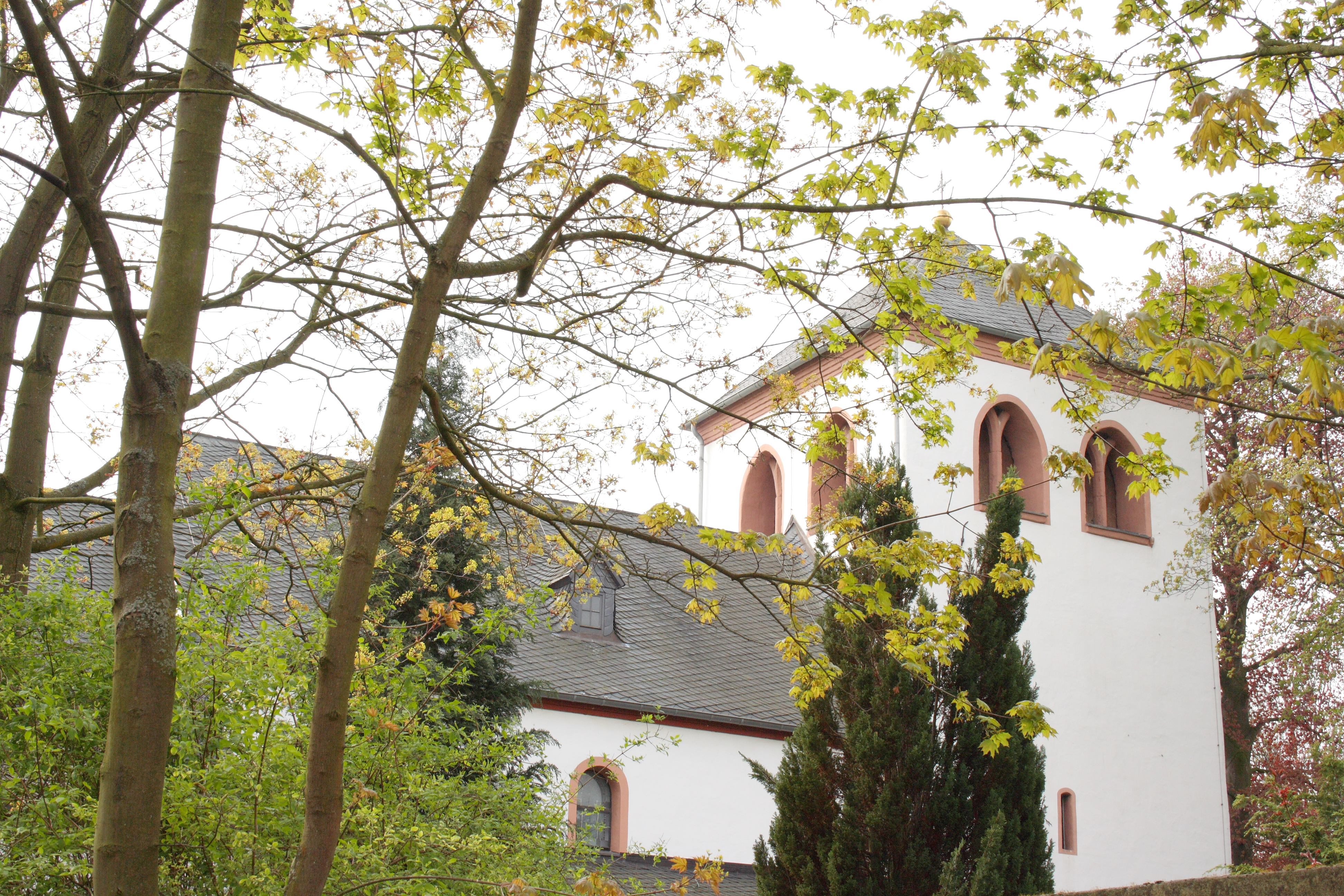 alte Pfarrkirche St. Peter und Paul in Kleinbüllesheim, heute orthodoxe Gemeinde Johannes der Täufer